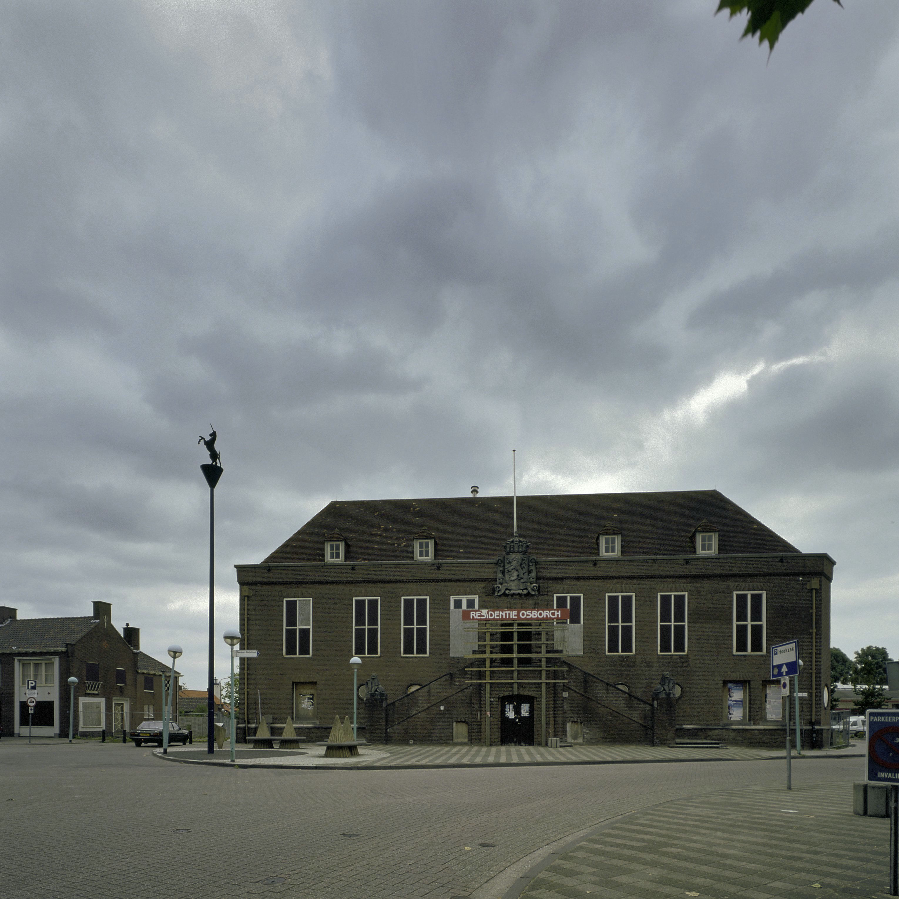 Voormalig Rijkskantorengebouiw Annex Kantongerecht: Overzicht van het plein met de voorgevel van het voormalige Rijkskantorengebouw annex Kantongerecht (opmerking: Gefotografeerd voor Toonbeelden van de Wederopbouw)